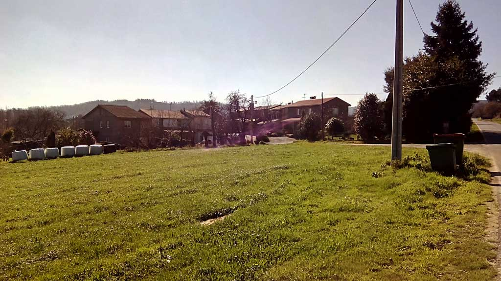 Vista de Garabatos, Cambre.